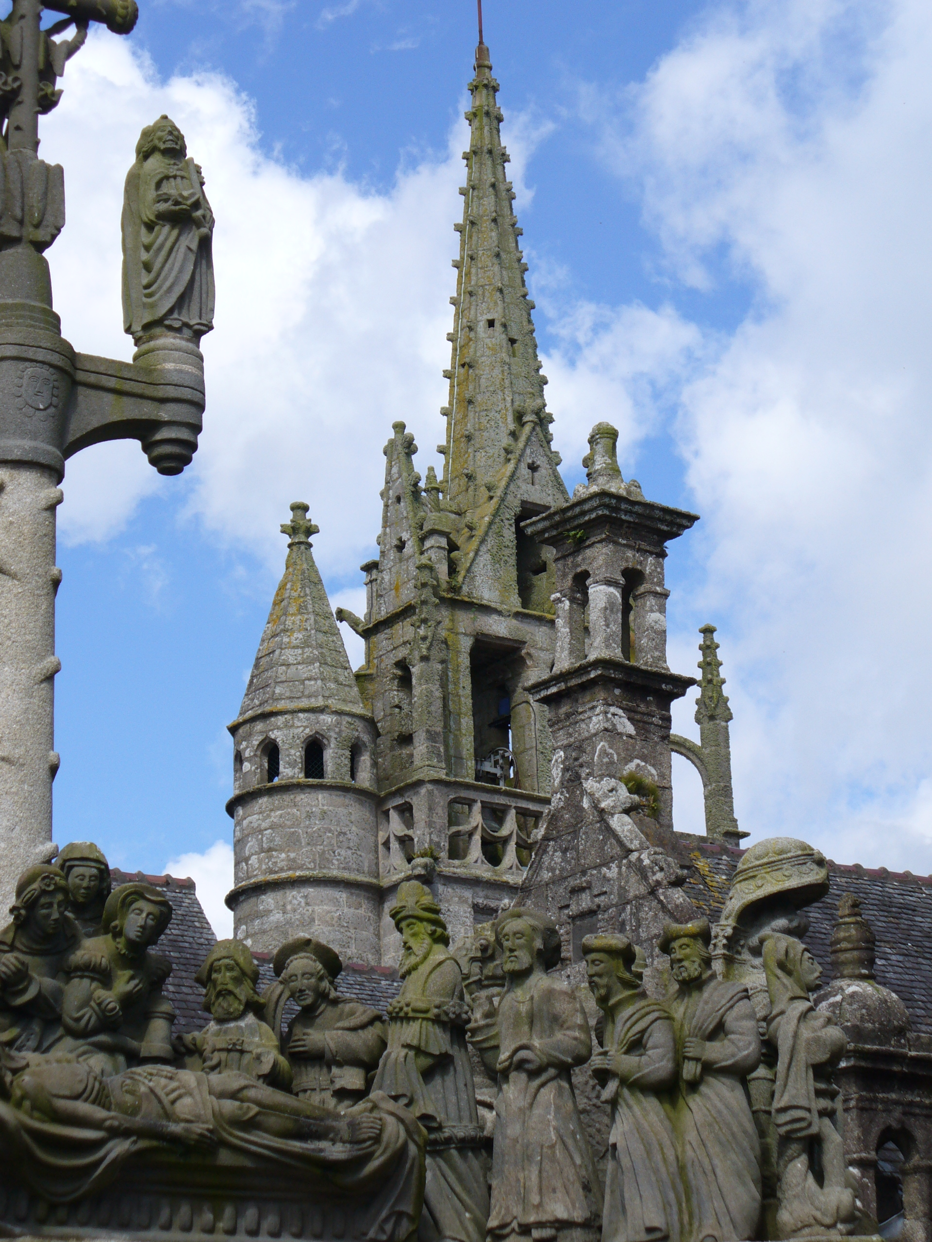 Calvaire-Kalvarienberg von Saint Miliau in Guimiliau zwischen 1581 und 1588 errichtet zeigt mit insgesamt 200 Figuren 17 Passionsszenen im Turm und im Fries 15 Szenen aus dem Leben Jesu-Enclos Paroissal-Umfriedeter Pfarrbezirk